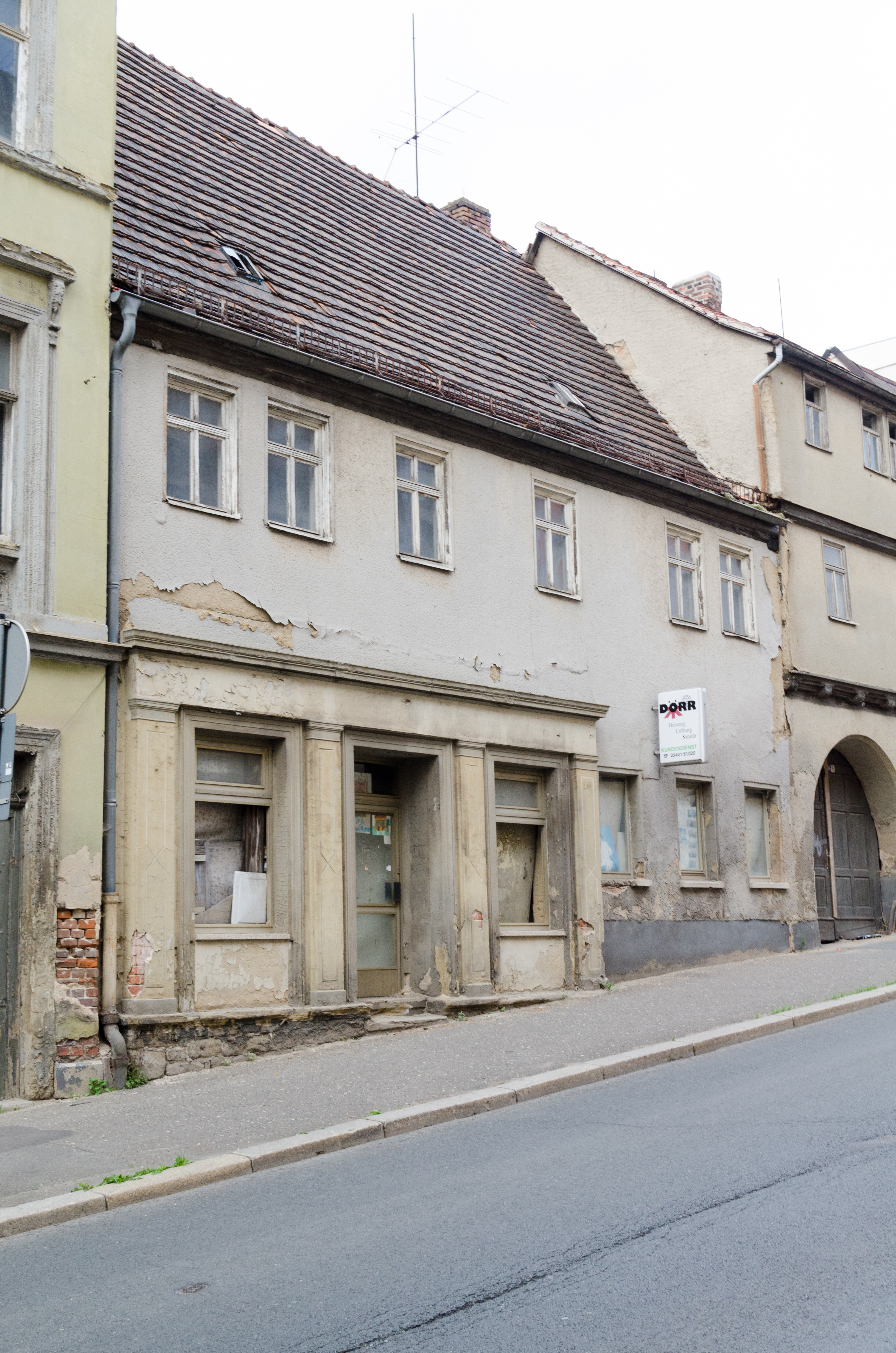 Zeitz, Rahnestraße 5